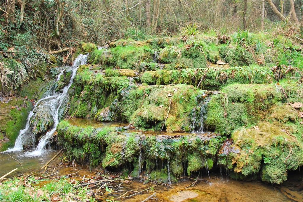 Formació de travertins a la Riera de'n Xuncla, al seu pas per Sant Gregori.